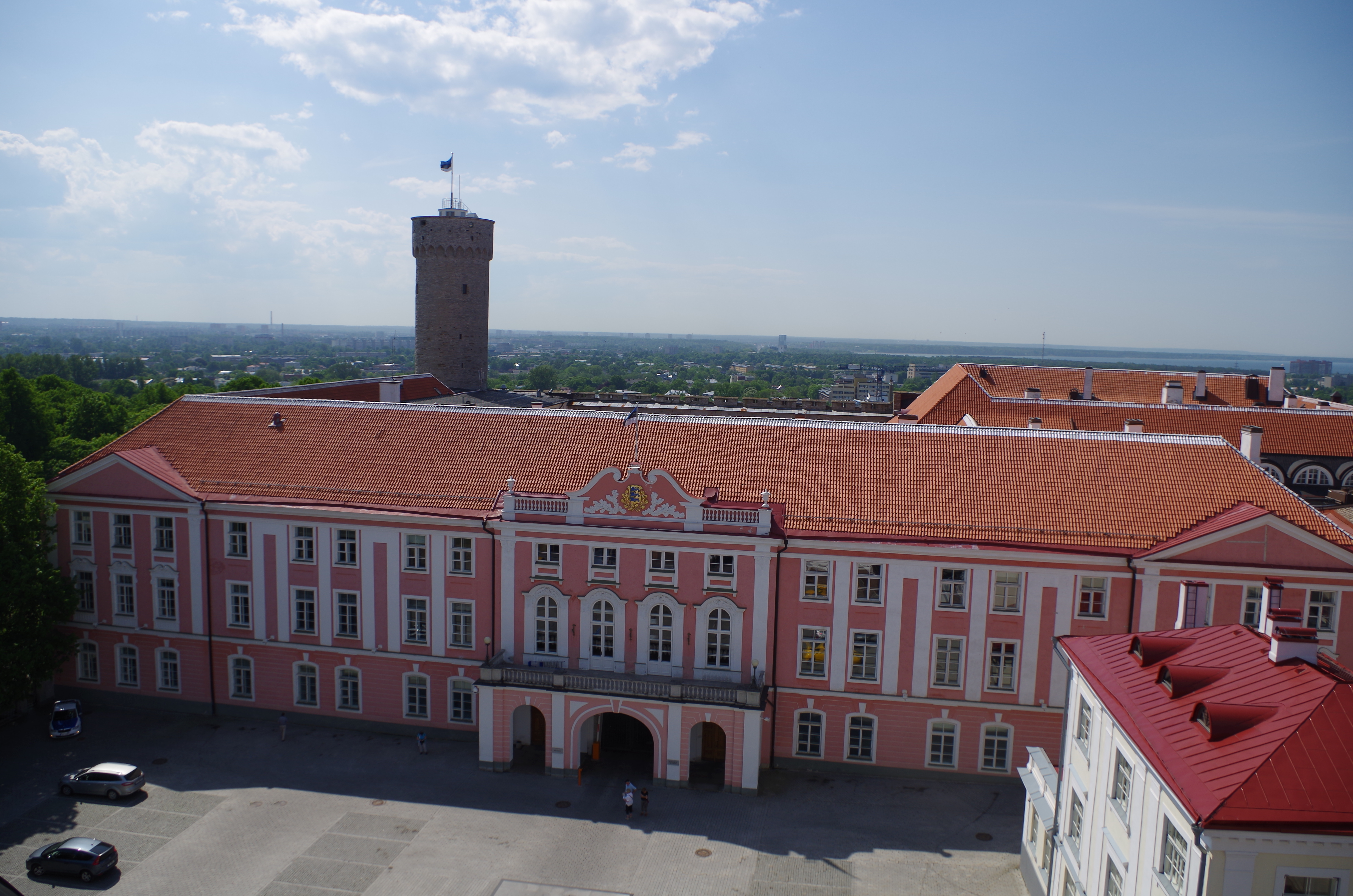 Toompea loss